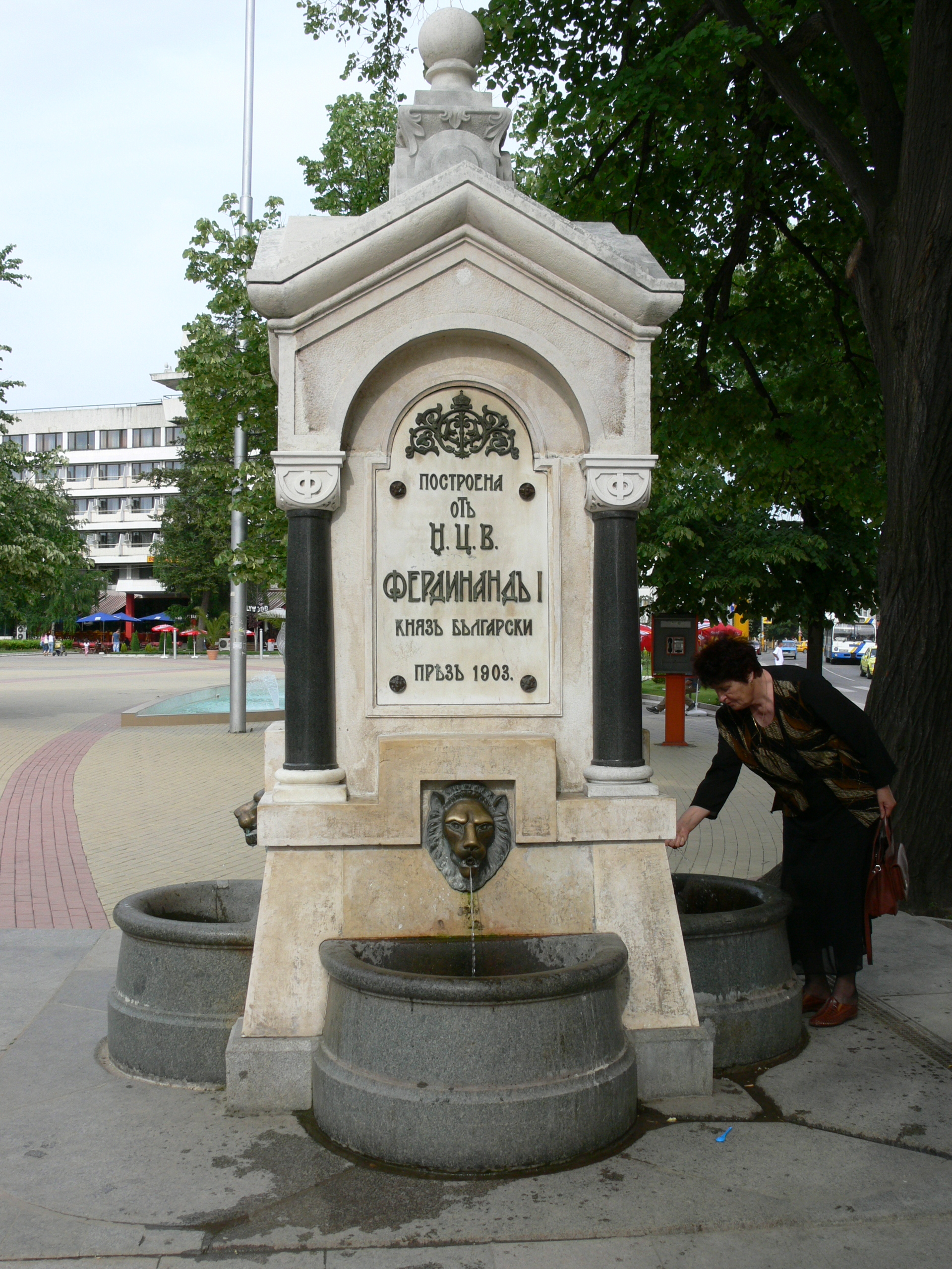 Drinking fountain in Kazanlak, Bulgaria